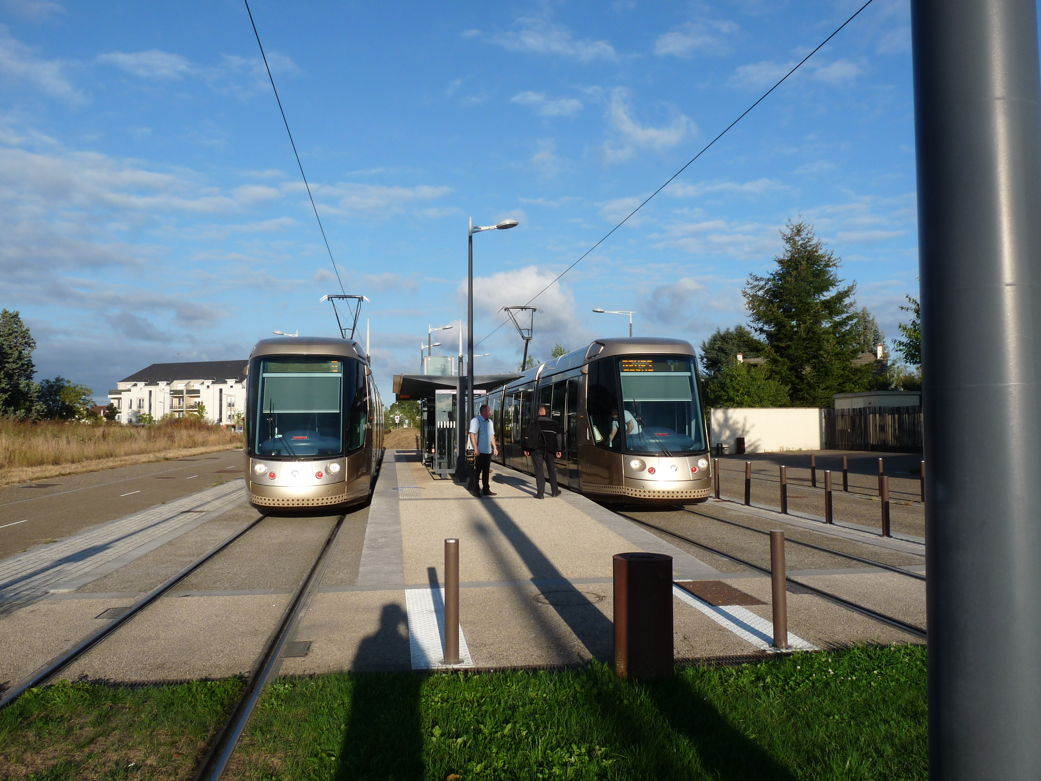 Tram in Orléans tramlijn B bij de eindhalte Clos du Hameau